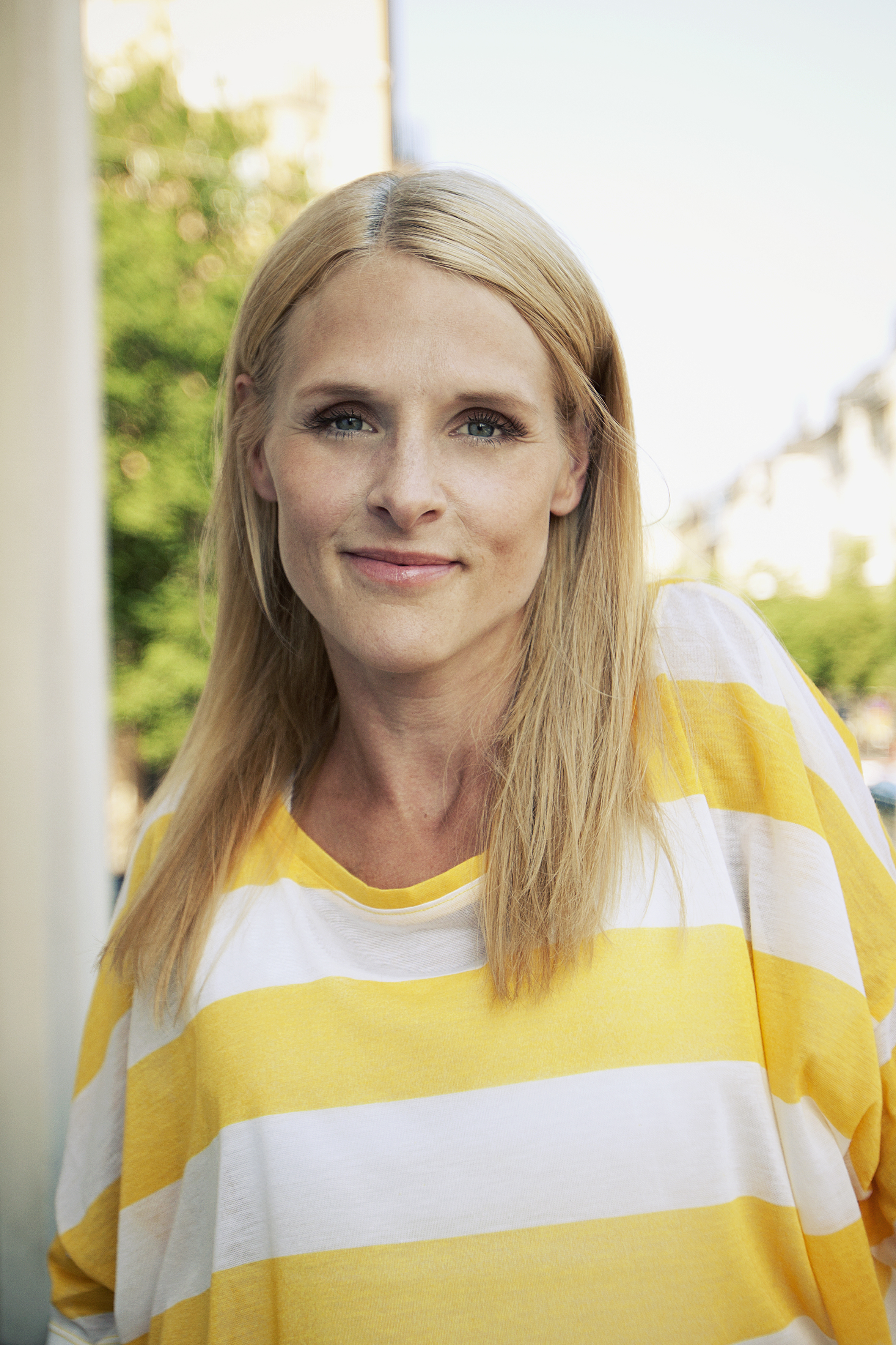 TV-producenten Karin af Klintberg.